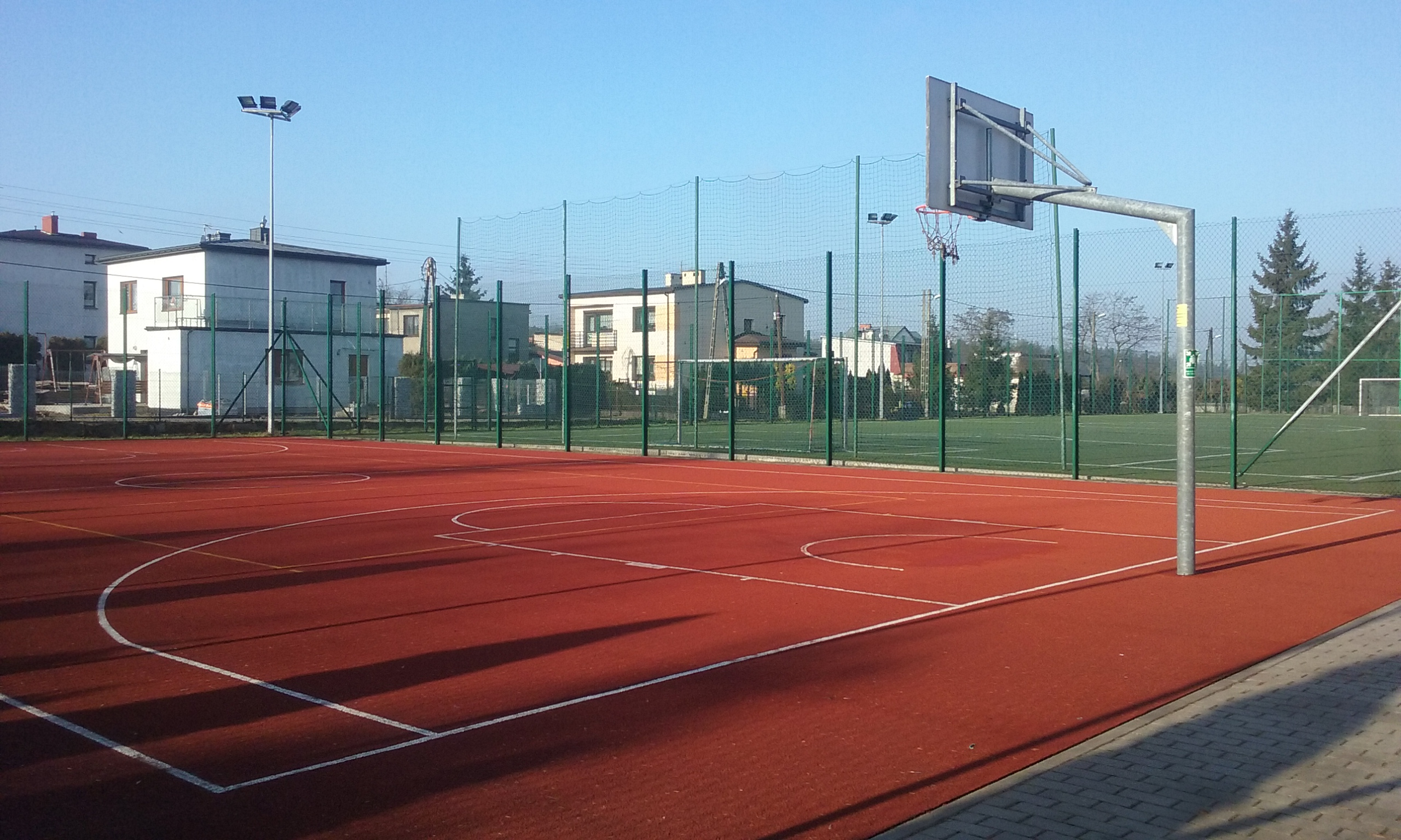 Boiska szkolne przy Szkole Podstawowej nr 3 w Tomaszowie Mazowieckim, w województwie łódzki, PL, EU. CC0